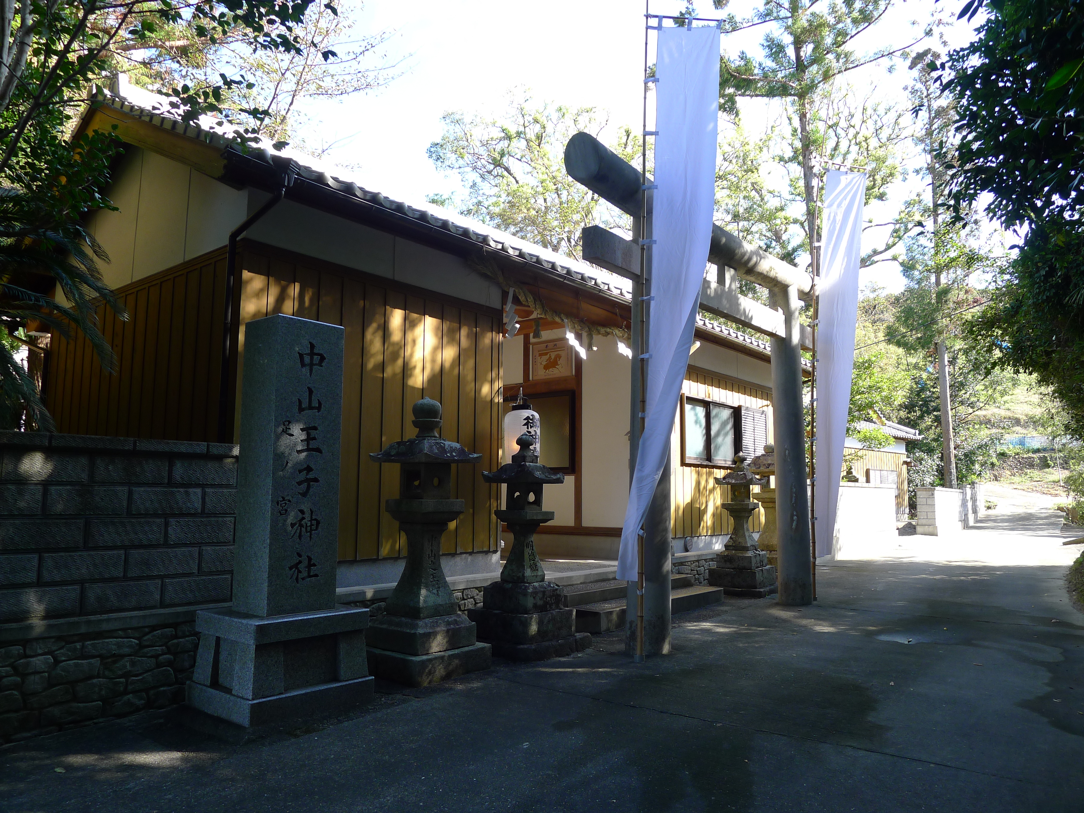 熊野古道・紀伊路の九十九王子の一つ切目中山王子を祀る中山王子神社（和歌山県印南町）